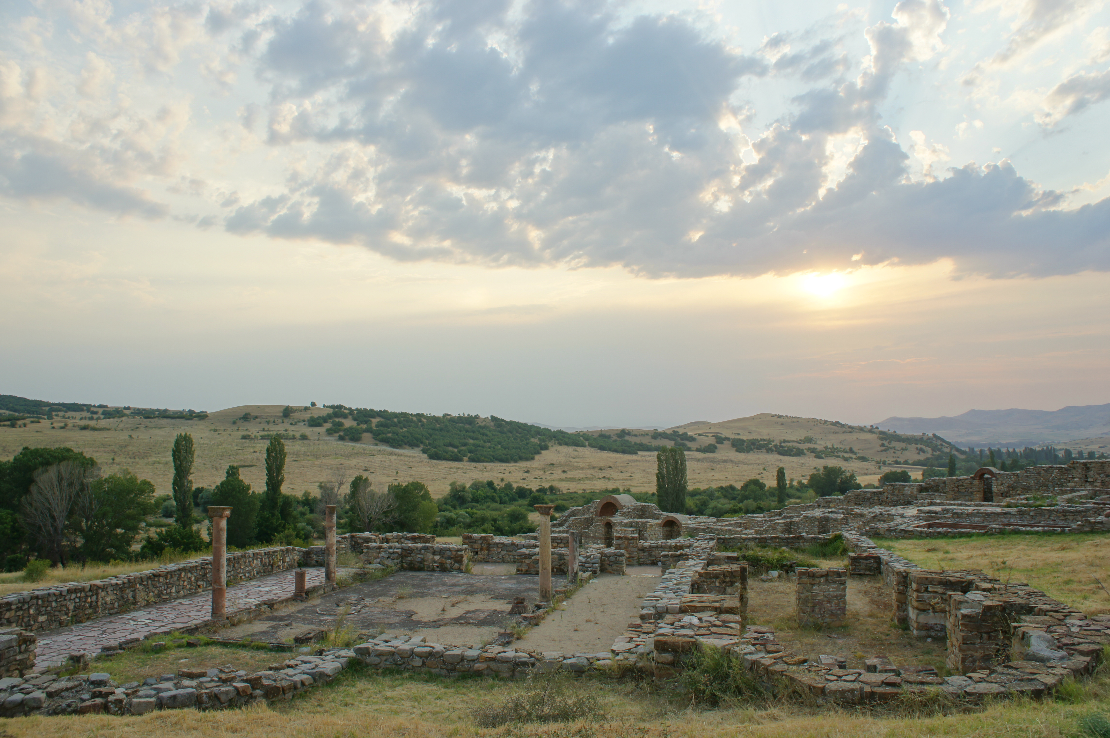 Античкиот град Баргала настанал кон крајот на 4 век, кој бил изграден како тврдина на граничниот појас меѓу провинциите Втора Македонија и Средоземна Дакија. Подоцна, градот бил разурнат, а жителите подигнале нов град крај Козјачка Река во близината на Горни Козјак. По губењето на стратешкото значење, Баргала прераснала во цивилен - епископски град. Во 5 век и во 6 век, а особено во времето на Јустинијан I (527-565), градот го достигнал својот врв, но кон крајот на 6 век, во неколку наврати, настрадал од аварско-словенските походи кои го треселе Балканот. Градот не бил потполно напуштен, меѓутоа опстојувал како неурбанизирана населба. Понатаму, во средниот век се оформила нова населба, чиј белег е црквата "Свети Ѓорги", изградена кон крајот на втората половина на 9 век. Околу црквата "Св. Ѓорги" е откриена некропола која, според наодите, егзистирала почнувајки од 7 век.